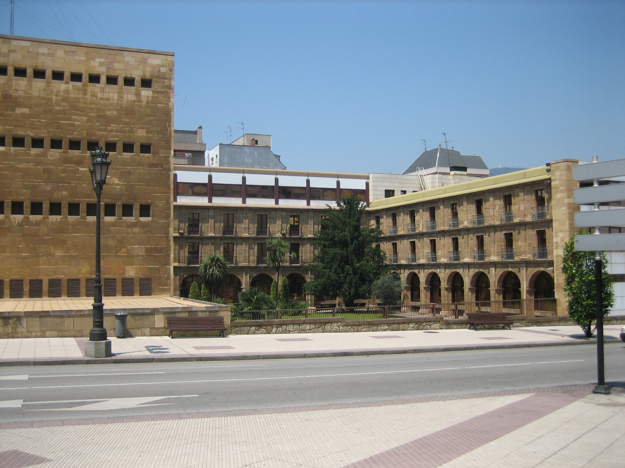 Convento de Santa Clara, Sede de Hacienda en Oviedo.